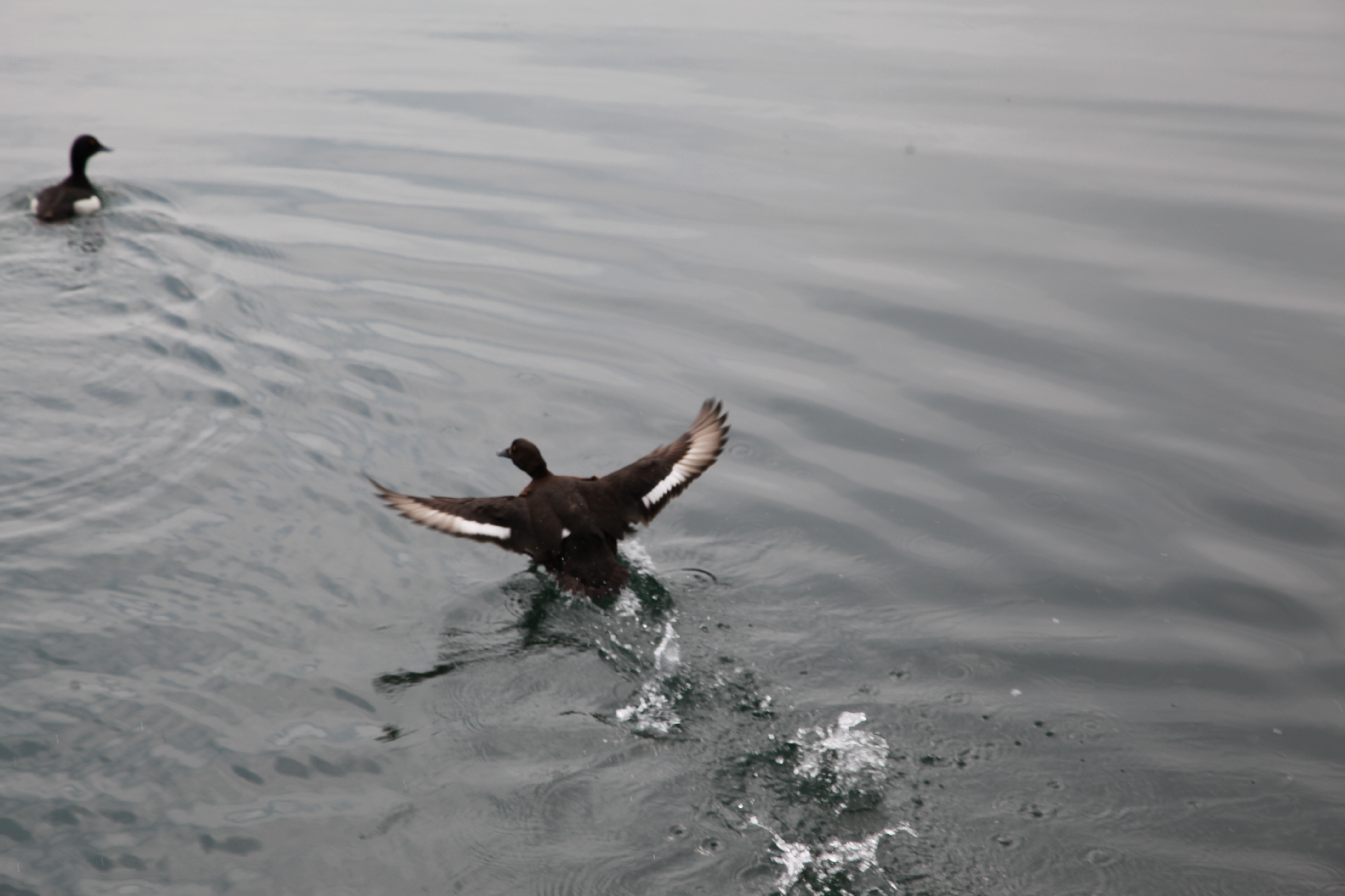 Naturschutzgebiet Lengeder Teiche, Reiherenten (Aythya fuligula) auf einem der Teiche